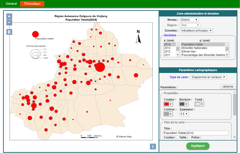 Makan Map carte thématique